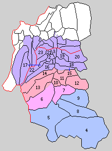 長野県南佐久郡の町村。